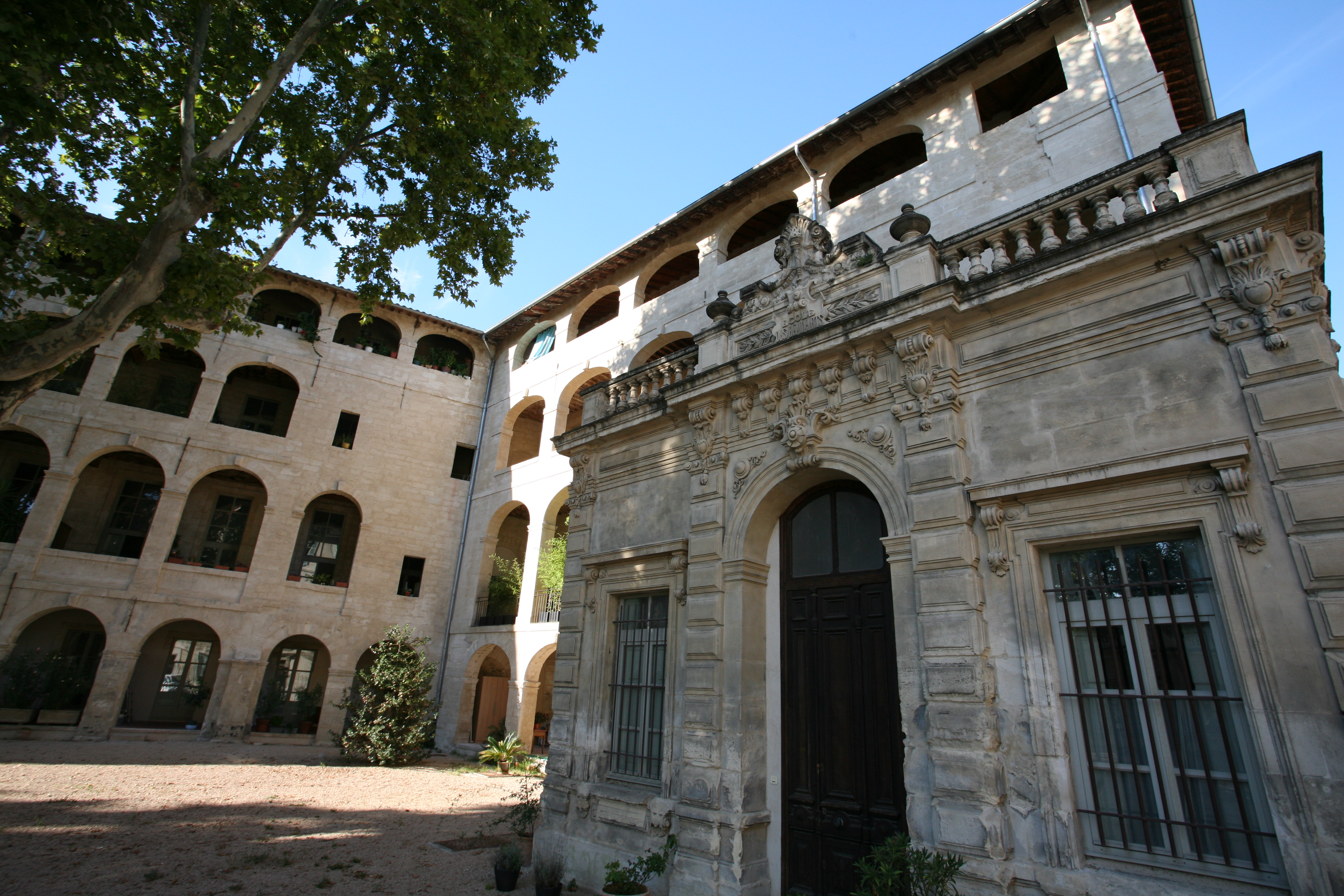 Clos des arts, Avignon, Vaucluse, France.